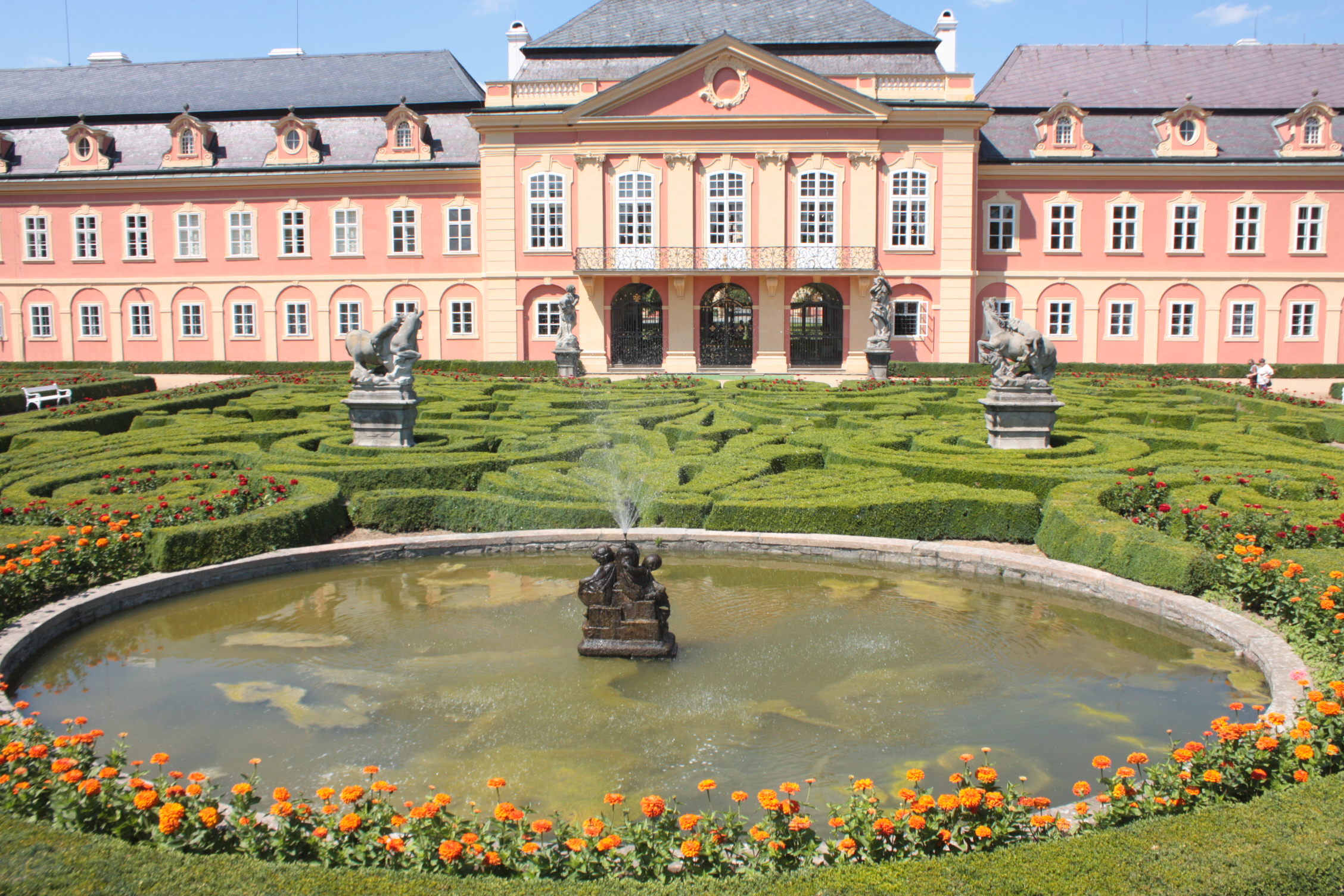 Zámek Dobříš